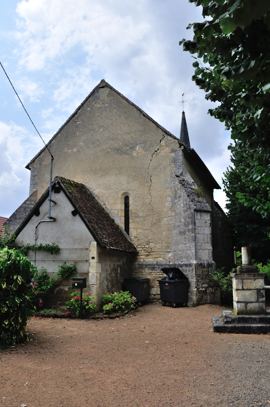 Saint-Aubin (Indre) - Eglise Saint-Aubin